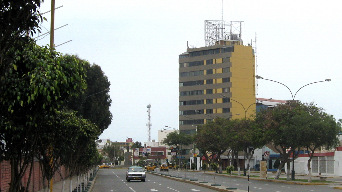 Toma de la avenida España, construida sobre la antigua Muralla de Trujillo, rodea el monumental "centro histórico de Trujillo", al fondo el edificio "España" en la ciudad de Trujillo (Perú)